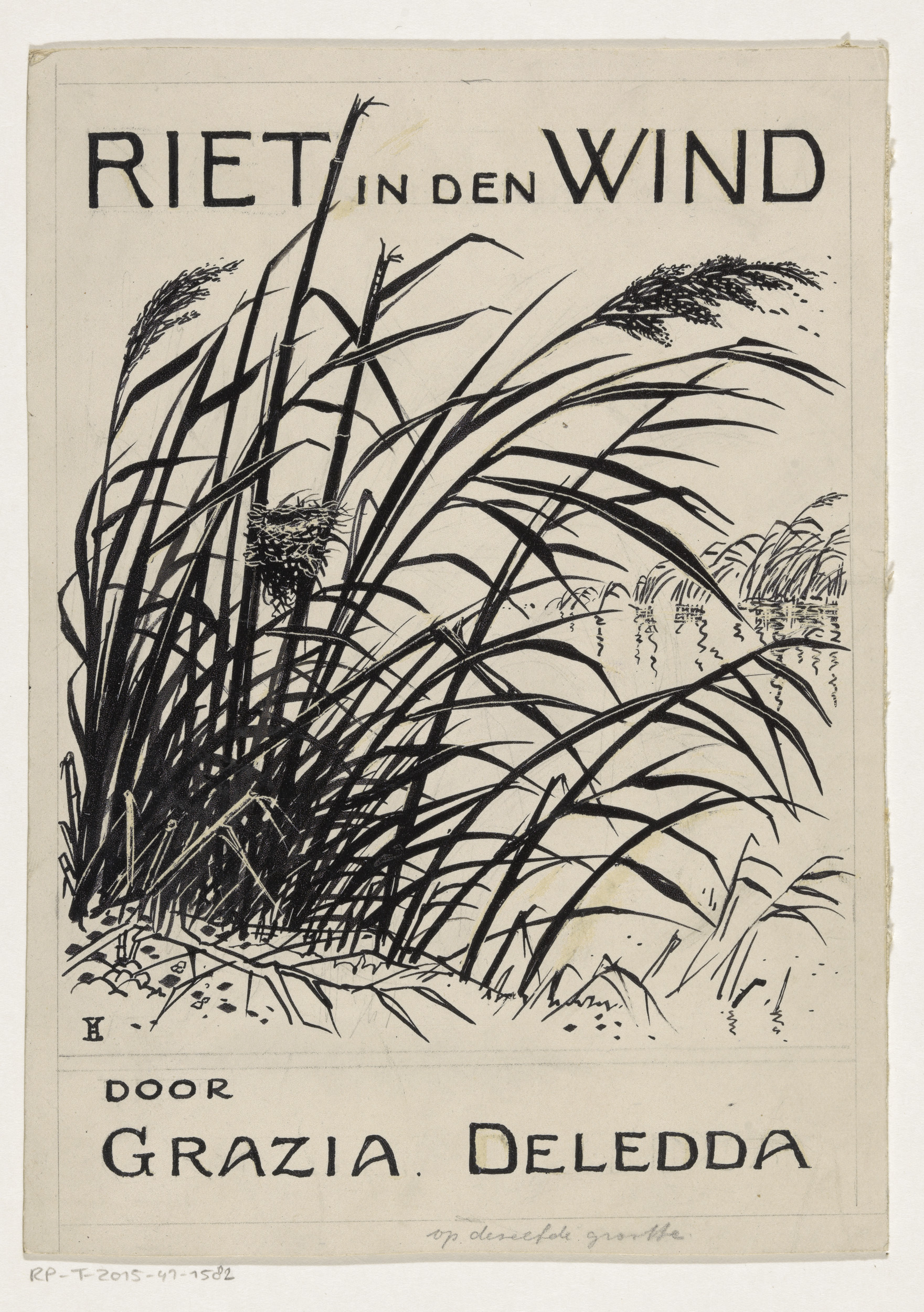 IdentificatieTitel(s): Bandontwerp voor: Grazia Deledda, Riet in den wind (Canne al vento), 1930Objecttype: tekening boekband (ontwerp) Objectnummer: RP-T-2015-41-1582Opschriften / Merken: monogram, recto, handgeschreven: Hoofdletters H en V ineen. cliché aanwijzing, recto en verso, handgeschreven verzamelaarsmerk, verso, gestempeld: Lugt 2228Omschrijving: Riethalmen wapperen in de wind.VervaardigingVervaardiger: tekenaar: Henri Verstijnen (eigenhandig gesigneerd)Datering: in of voor 1930Fysieke kenmerken: pen in zwart over potloodMateriaal: karton inkt potlood Techniek: penAfmetingen: h 212 mm × b 152 mmOnderwerpWat: plants and herbs: reedVerwerving en rechtenCredit line: Schenking van Uitgeverij L.J. VeenVerwerving: schenking 1970Copyright: Publiek domein